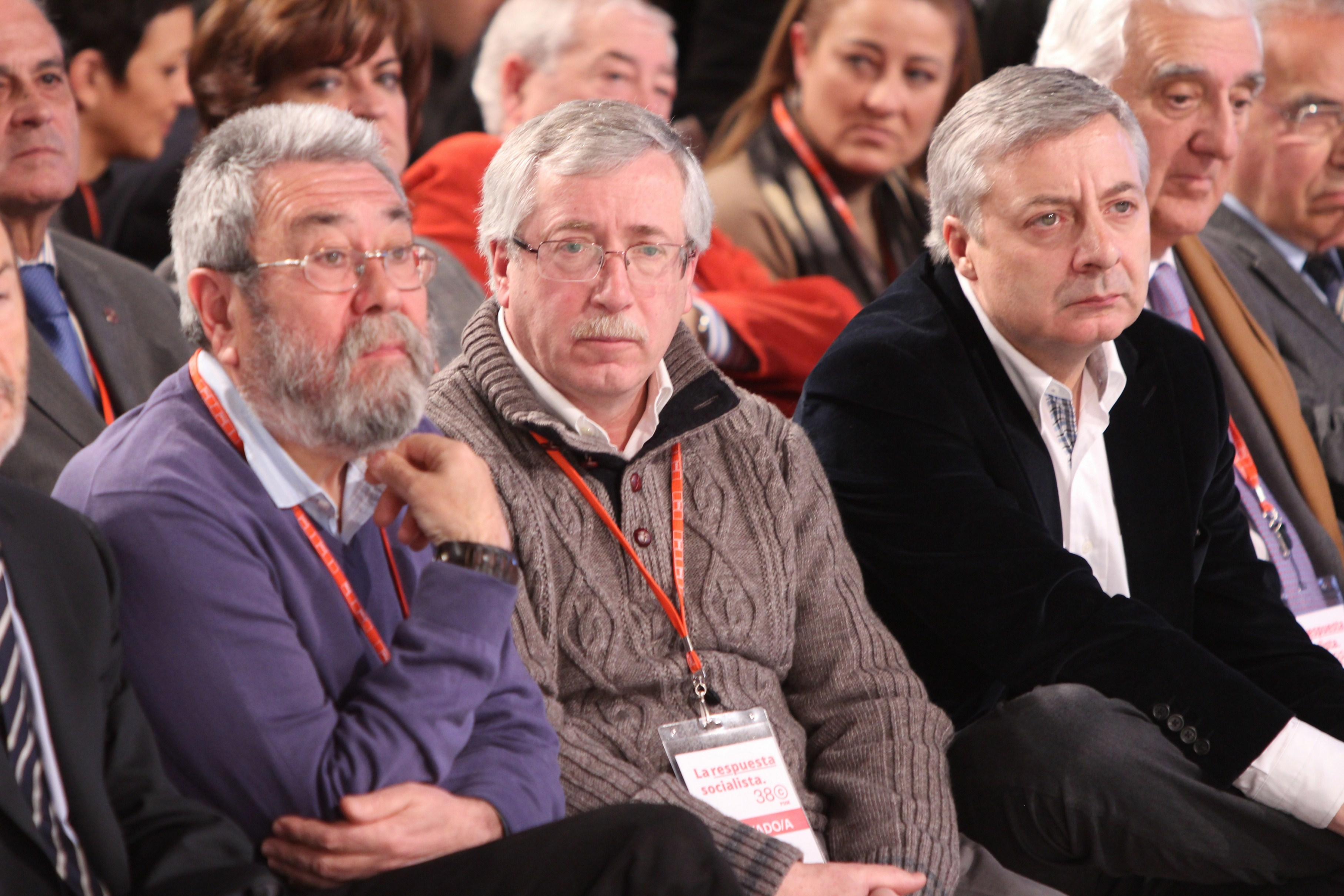 Cándido Méndez, Ignacio Fernández "Toxo" y José Blanco en la clausura del 38 Congreso del PSOE